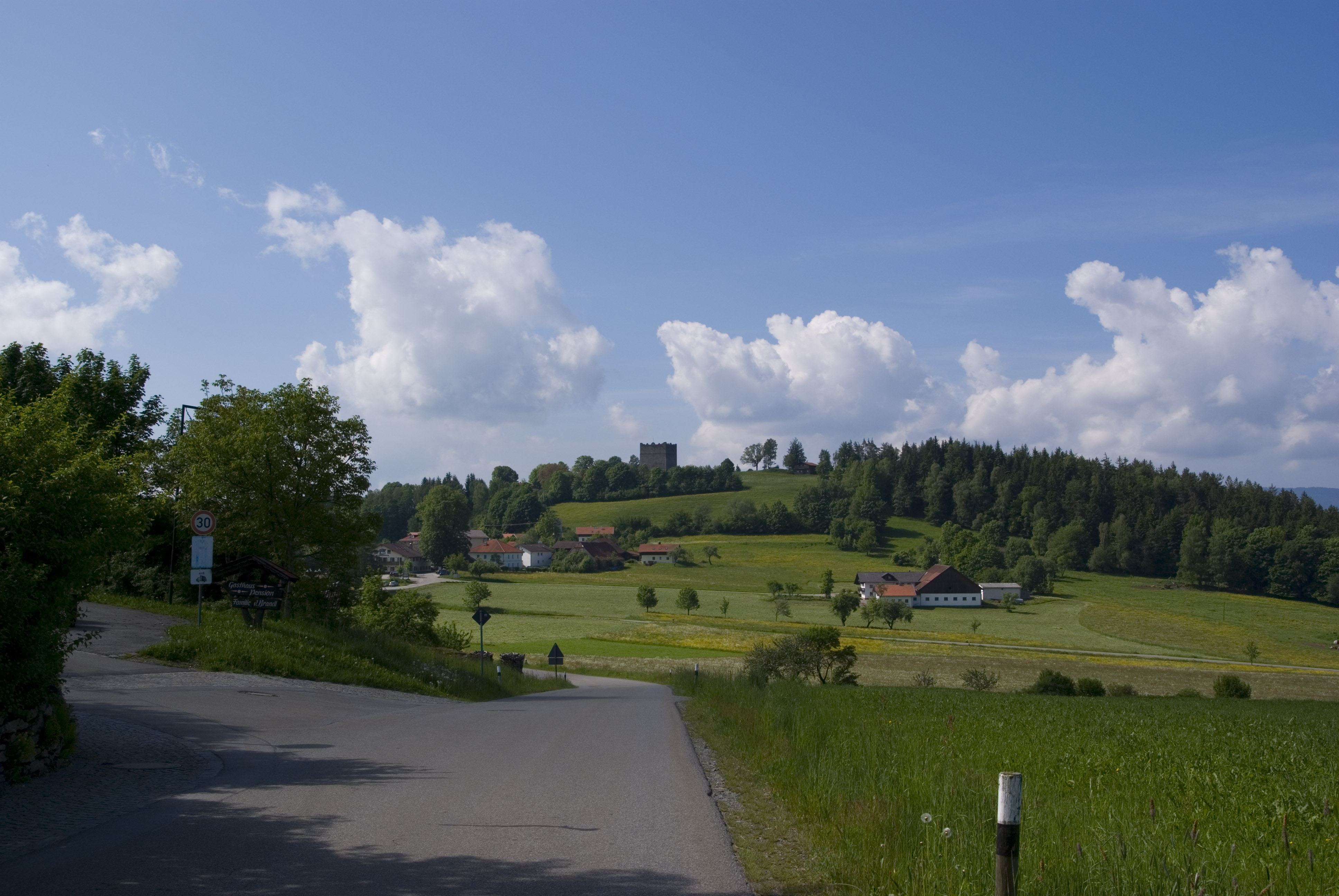 Burgruine Neunussberg von Westen